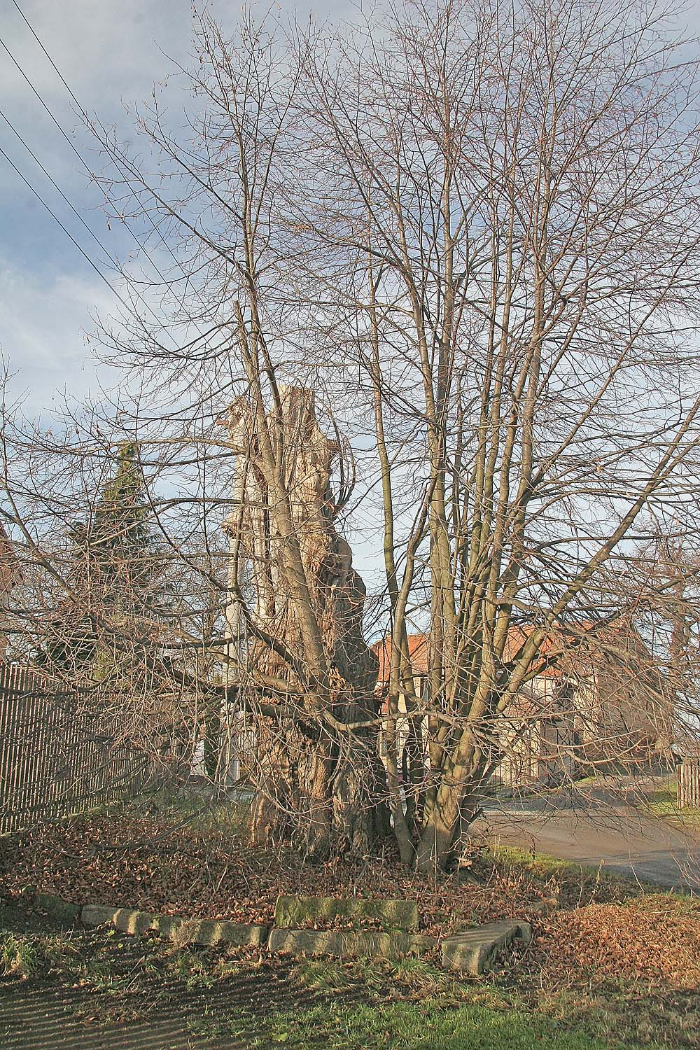 Torzo památné Úhrovské lípy, district Havlíčkův Brod autor: Prazak date: 15. 12. 2006